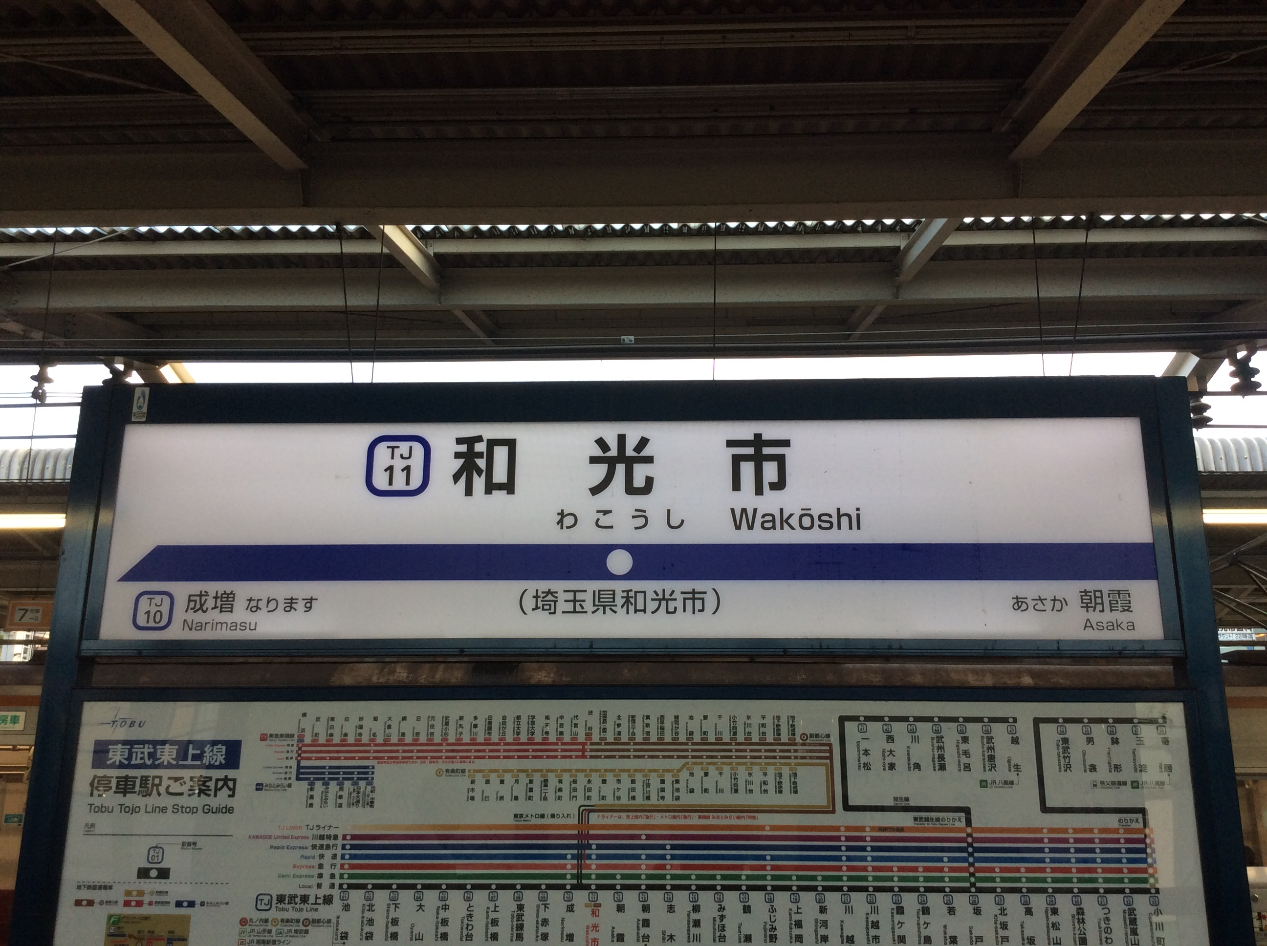 和光市駅の駅名標